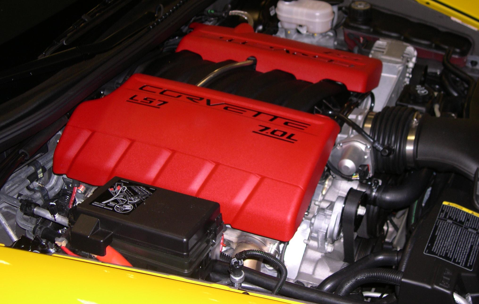 2006 Chevrolet Corvette Z06 LS7 7.0 L V8 engine